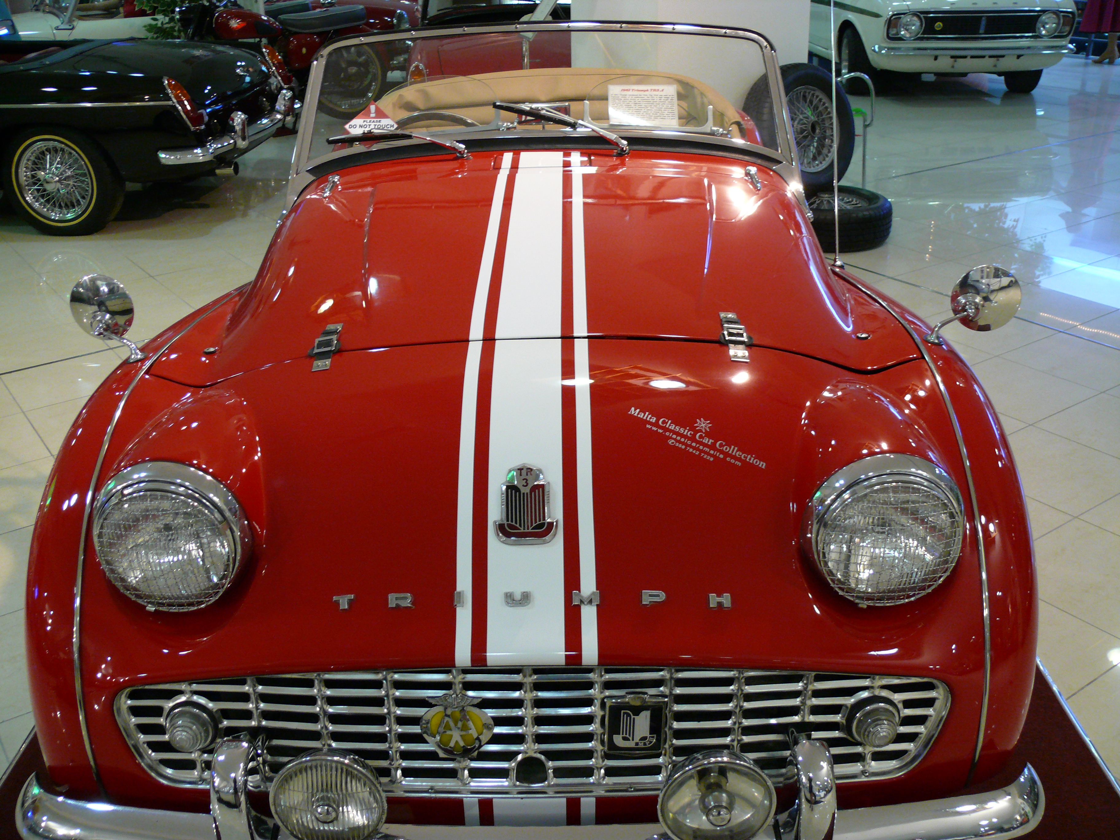 Triumph TR3A, Malta Classic Car Museum